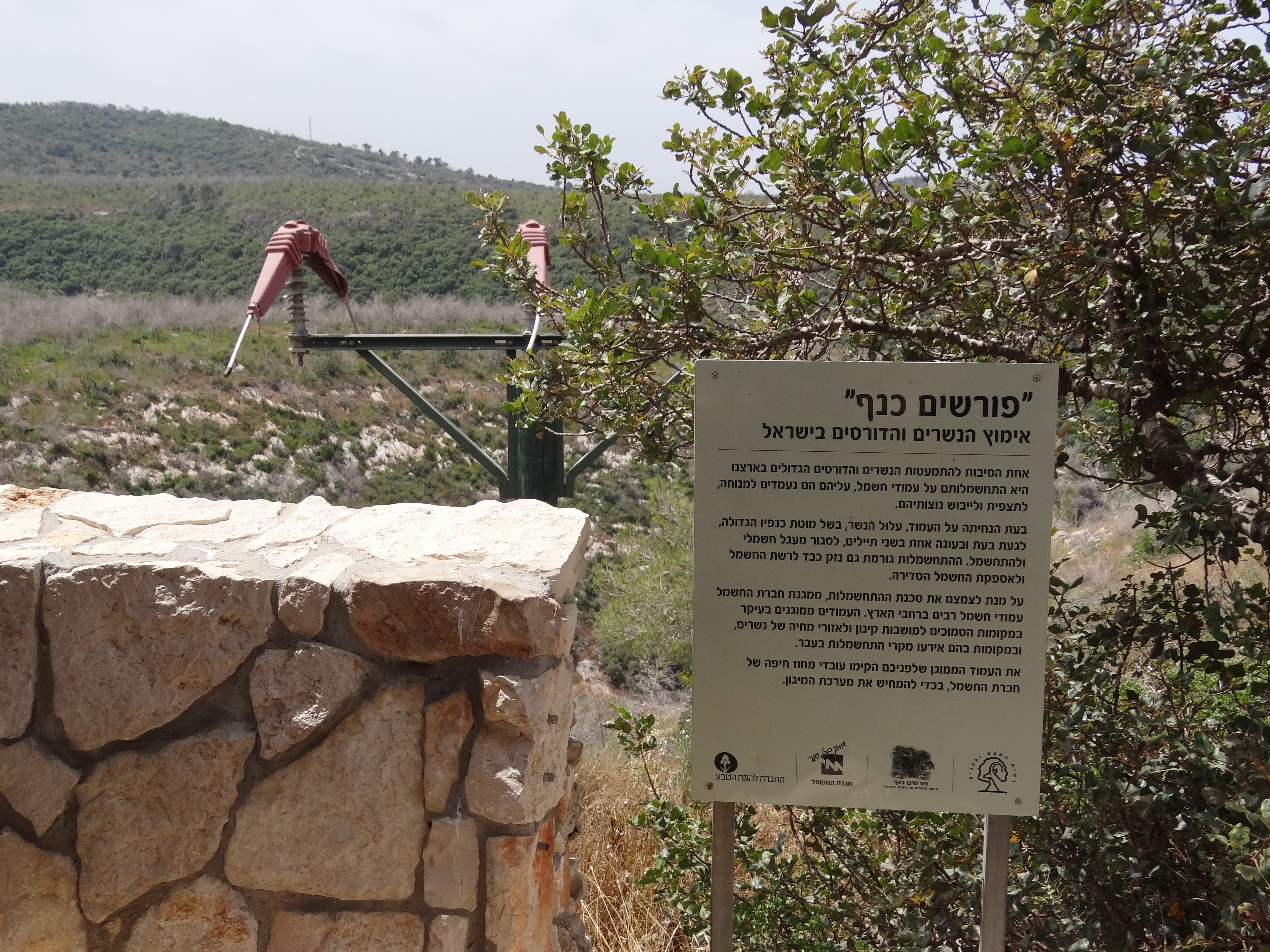 Category:Carmel Hai-Bar Nature Reserve, Animal Nature Reserve. Mount Carmel Israel חי-בר כרמל משמש כמקום רבייה לבעלי חיים שחיו בכרמל ונעלמו. ביניהם, אייל הכרמל, יחמור פרסי, נשר, עיטם זנב לבן, צבי ארצישראלי, עז בר וכבש בר פרויקט פורשים כנף של חברת החשמל ביחד עם רשות הטבע והגנים